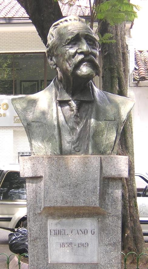 Busto de Fidel Cano, ubicado en el Parque Bolivar, Medellín, Colombia. En 1925 se instaló y se inauguró en el Parque de Bolívar el busto del periodista antioqueño Fidel Cano Gutiérrez, fundador del periódico El Espectador (el más antiguo de Colombia, el cual nació en Medellín). La escultura es obra del maestro Francisco Antonio Cano, y fue impulsada y financiada por la Sociedad de Mejoras Públicas de Medellín, acatando una ley del Congreso de 1920.